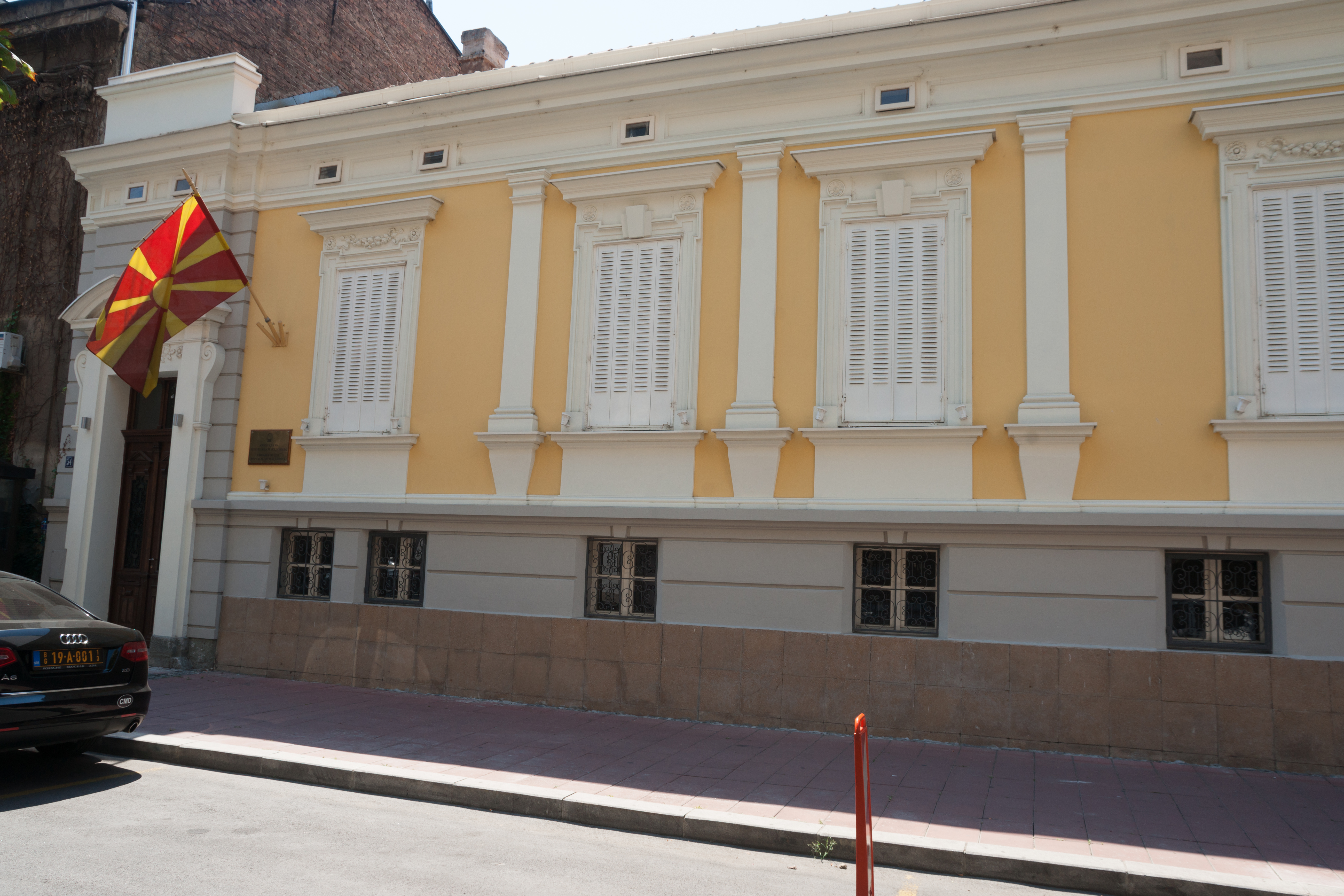 Macedonia embassy - Belgrade